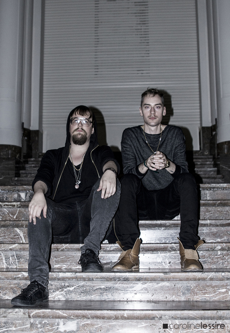 JETS (Jimmy Edgar + Machinedrum) (Leisure System)